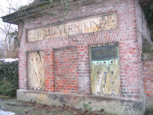 Mausoleum Putjatin (nah) auf dem Neuen Begräbnisplatz in Dessau, Stefan Keller, Aufnahme 01.2006